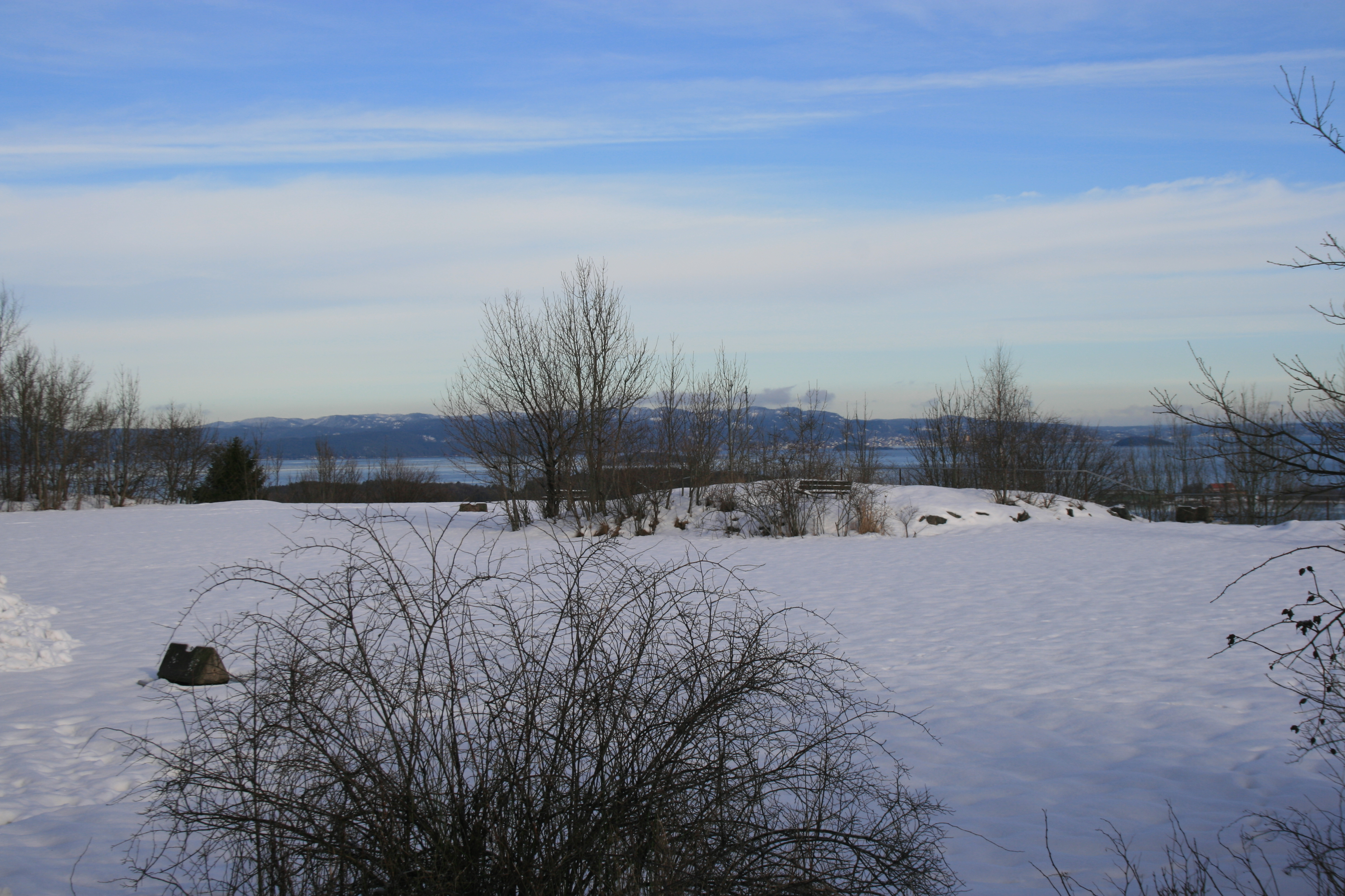 Bassengtaket i Horten kommune.